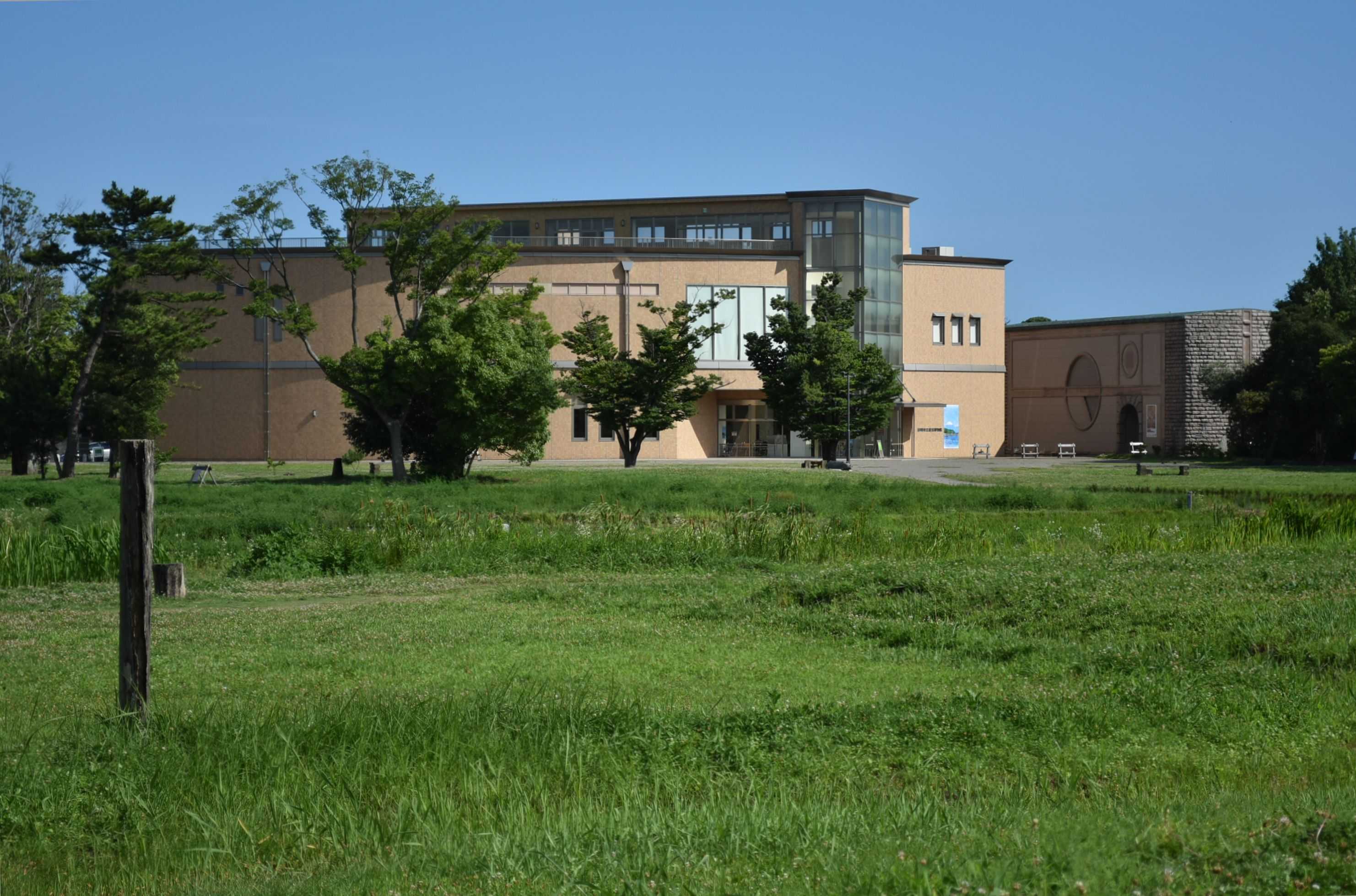 静岡市立登呂博物館